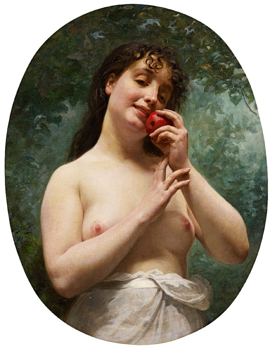 Eve.